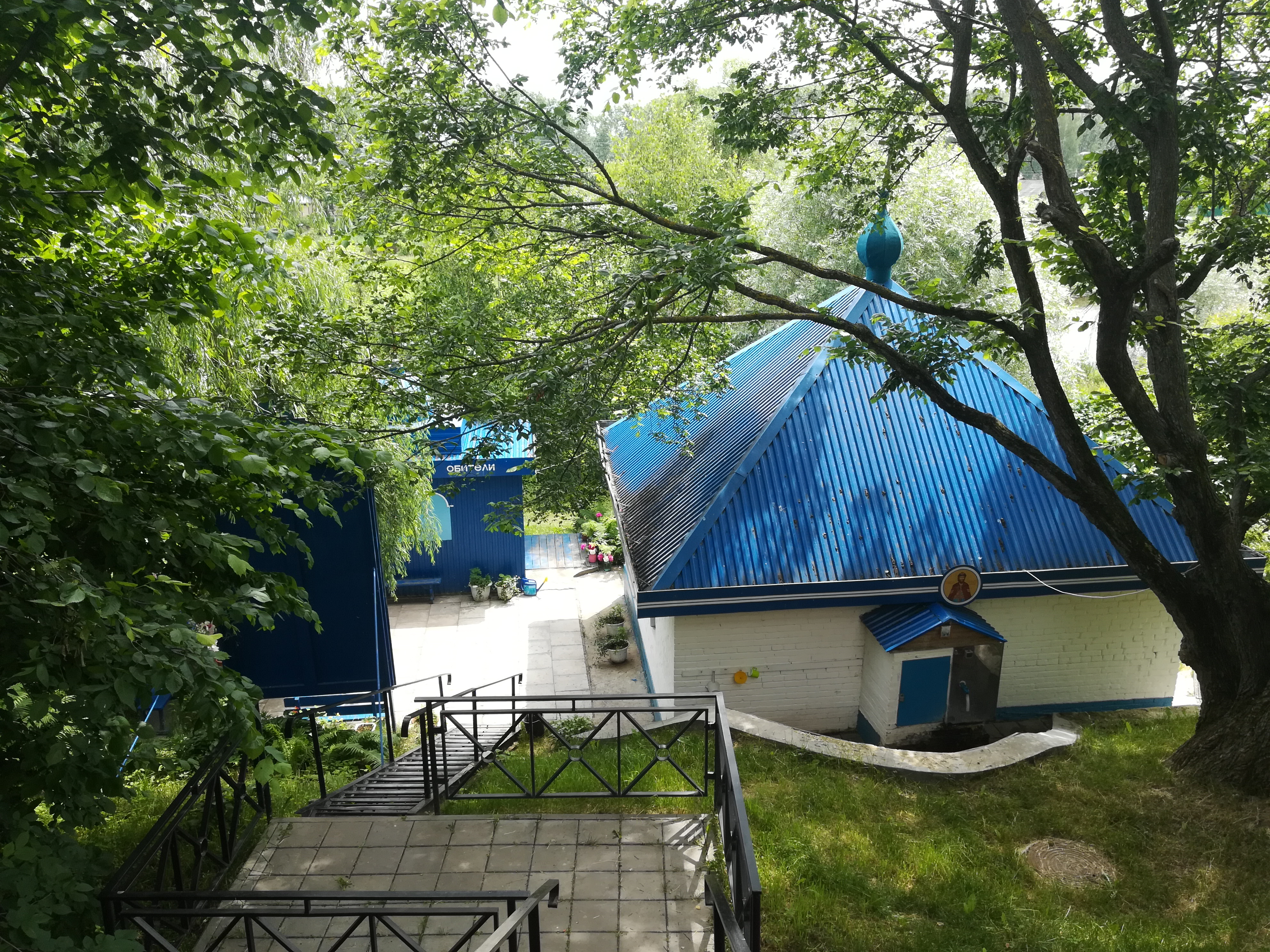 Боголюбово